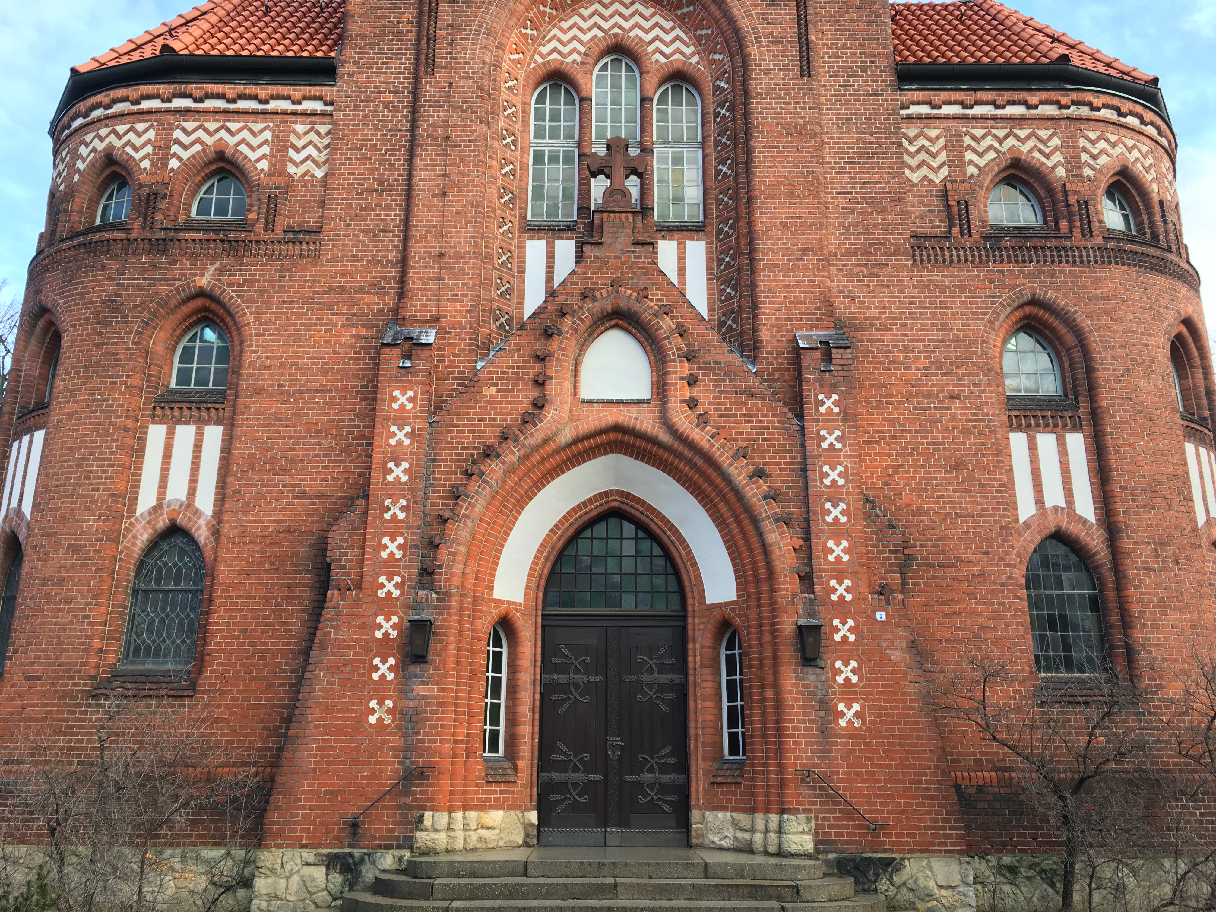 Die Dorfkirche in Eichwalde im Landkreis Dahme-Spreewald im Land Brandenburg entstand im Jahr 1908. Auf der Empore steht die einzige noch erhaltene Parabrahm-Orgel der Welt.